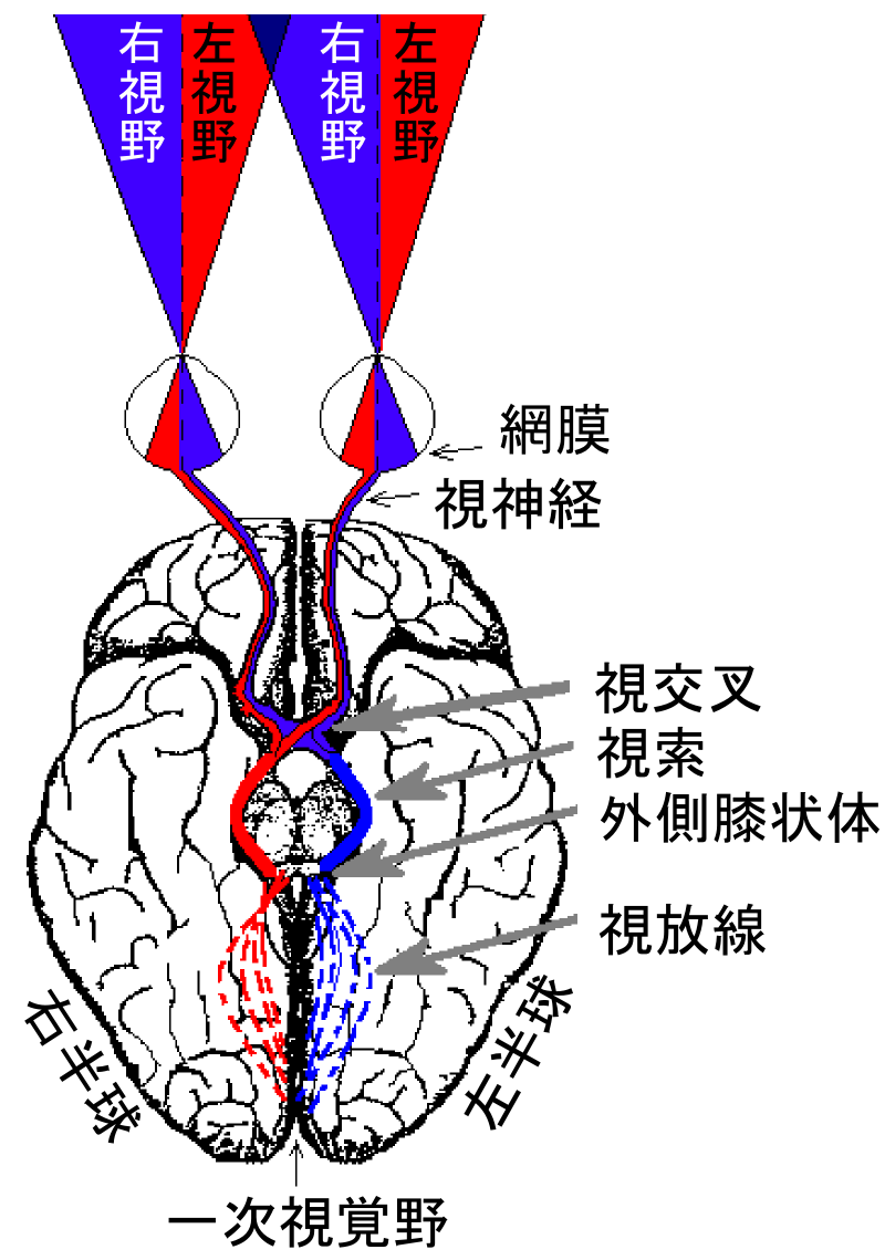 diagram from retina to visual cortex. text is japanese.